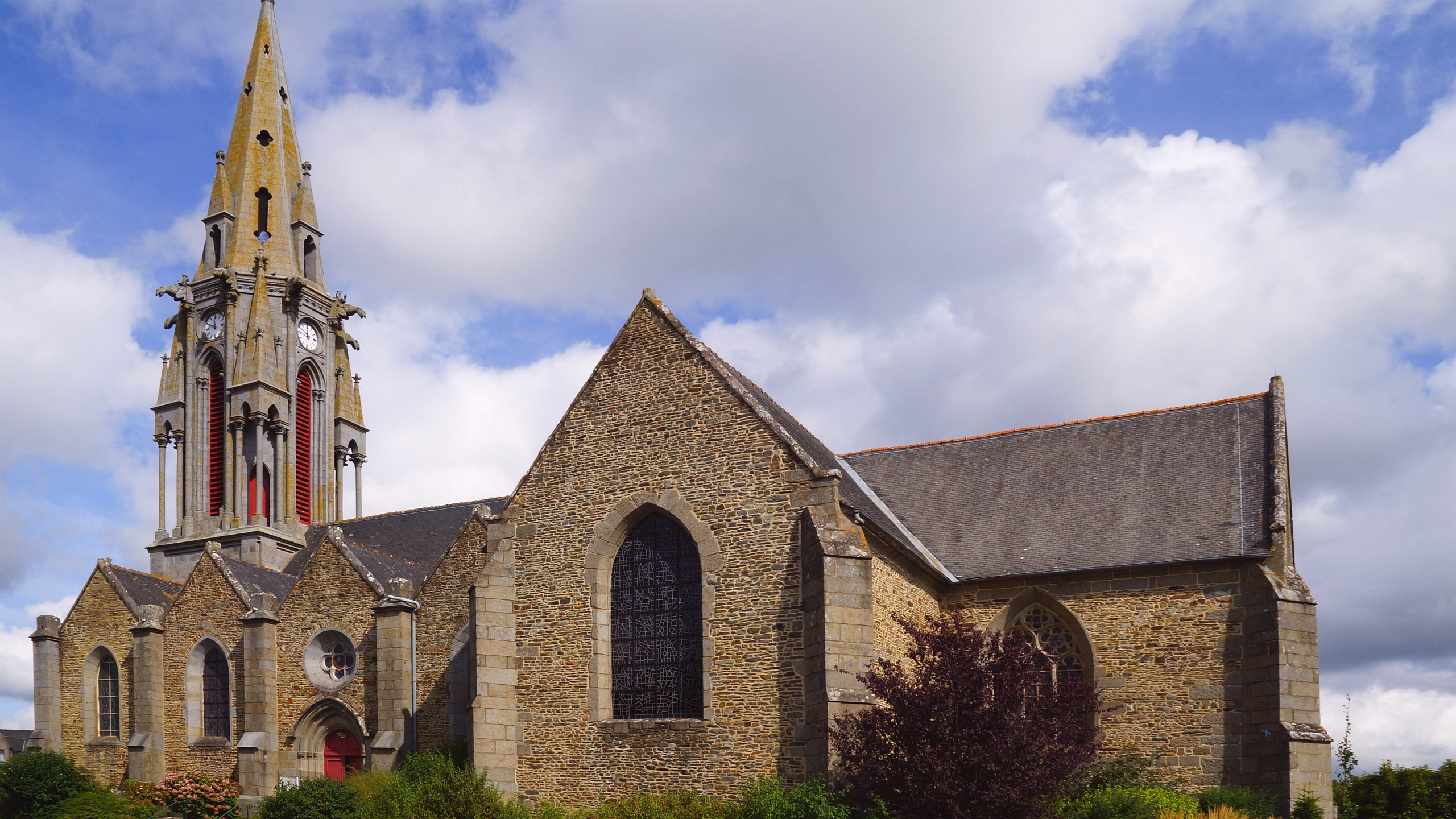 Kirche Saint-Martin in Meillac im Département Ille-et-Vilaine in der Bretagne, Frankreich Foto Wolfgang Pehlemann DSC05189